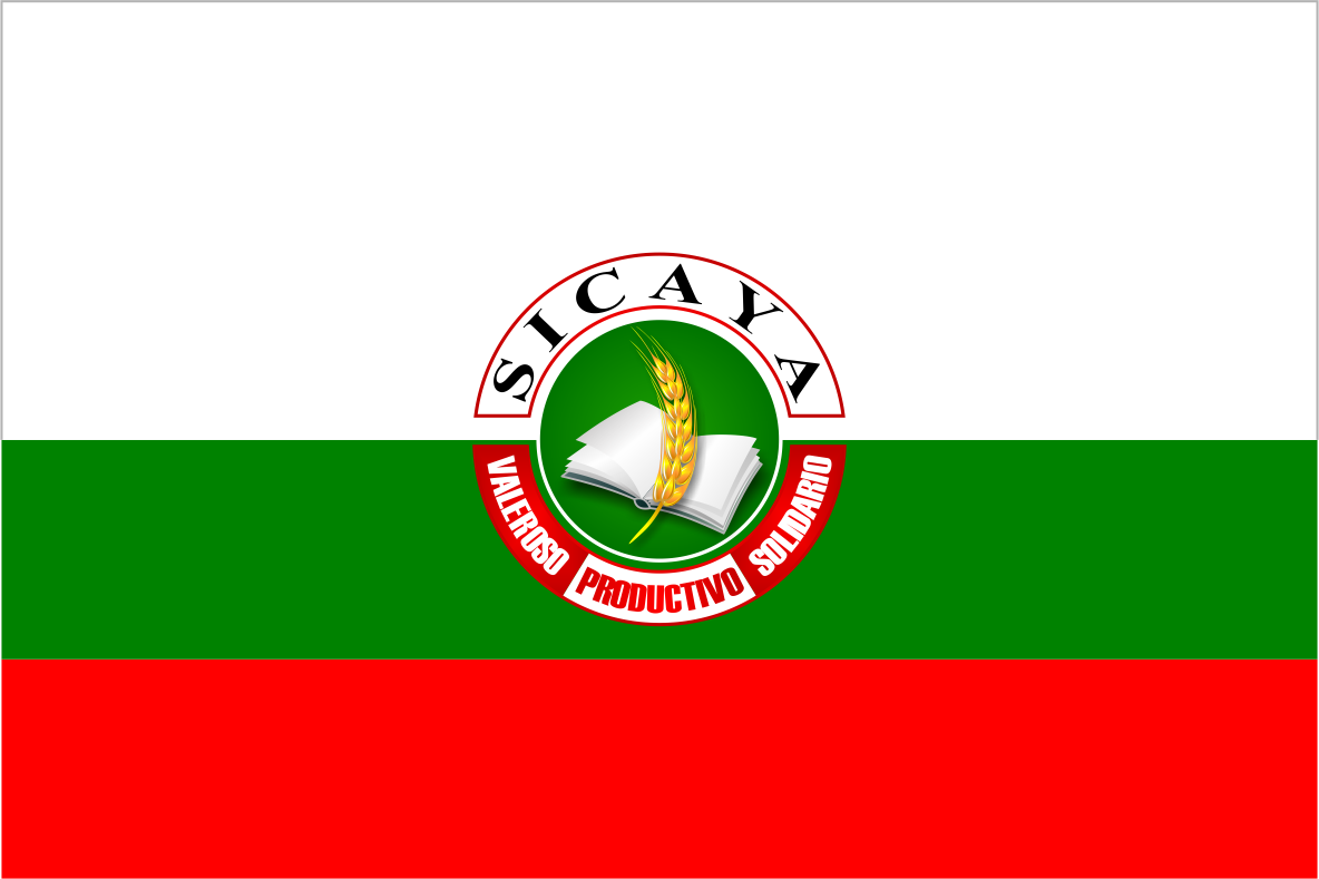 Distrito de Sicaya - Provincia de Huancayo - Región Junín